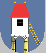 znak města Žandov